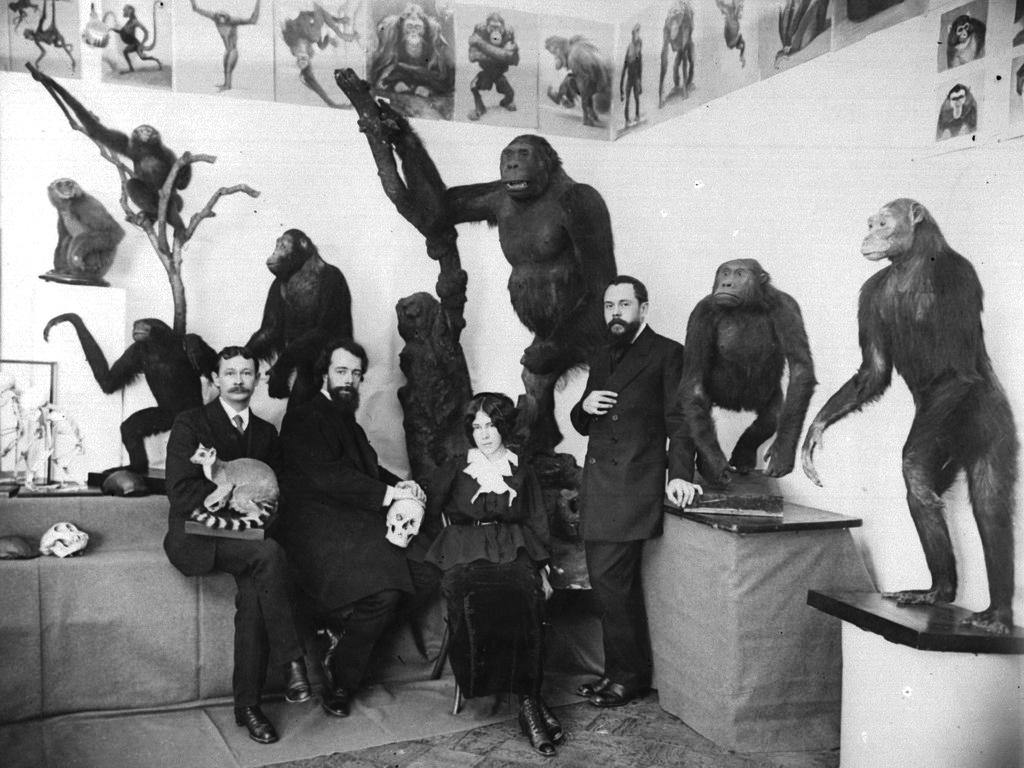 Основатели Дарвиновского музея